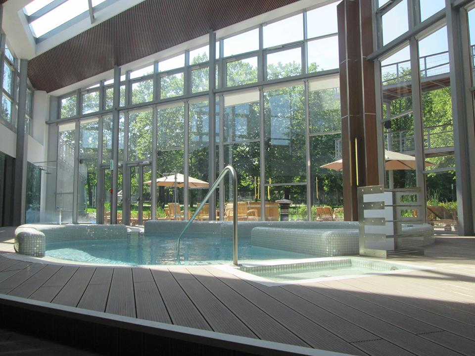 Wellnessház